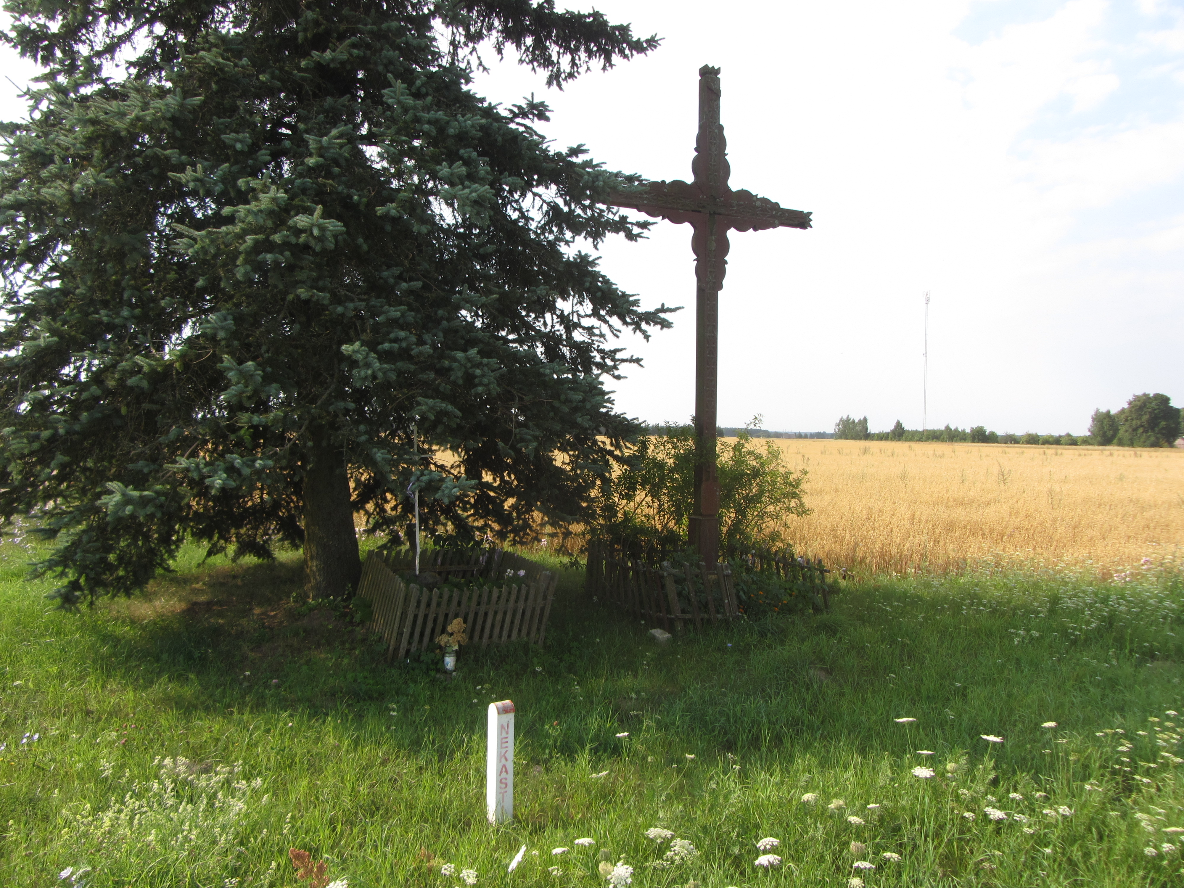 Leipalingio sen., Lithuania